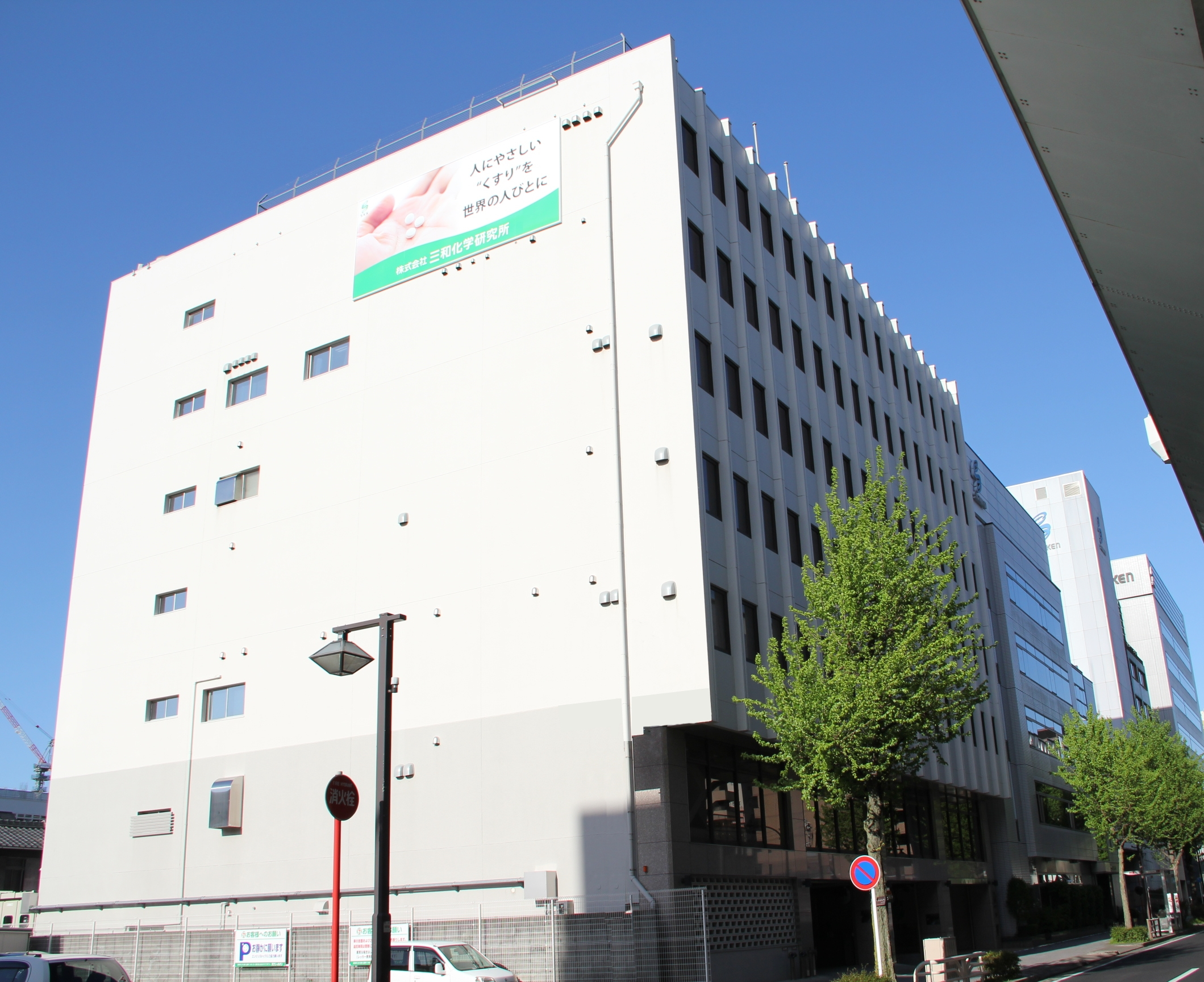 三和化学研究所本社